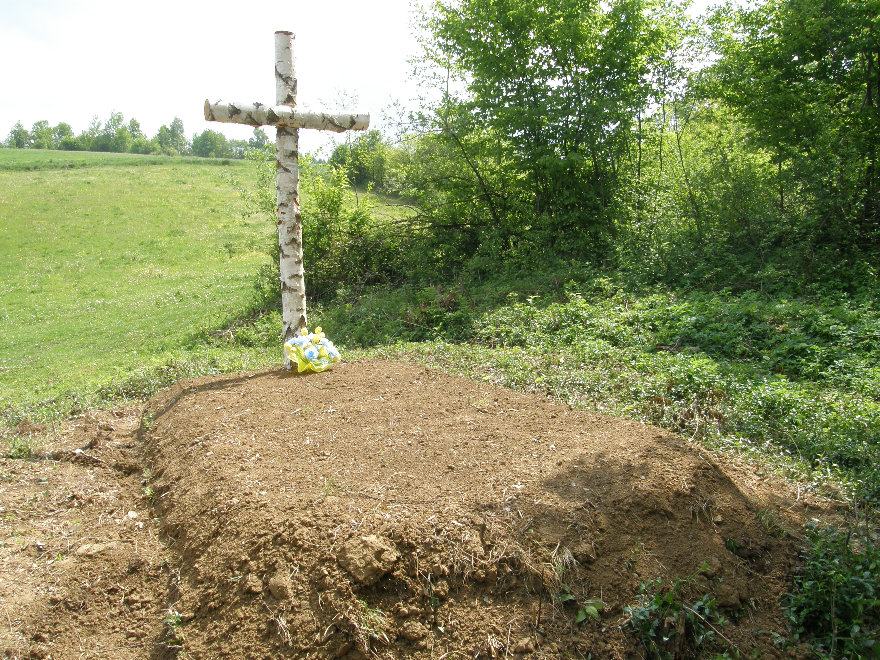 Mogiła Ukraińców zamordowanych w kwietniu 1945 w Sufczynie przez polskie oddziały partyzanckie.